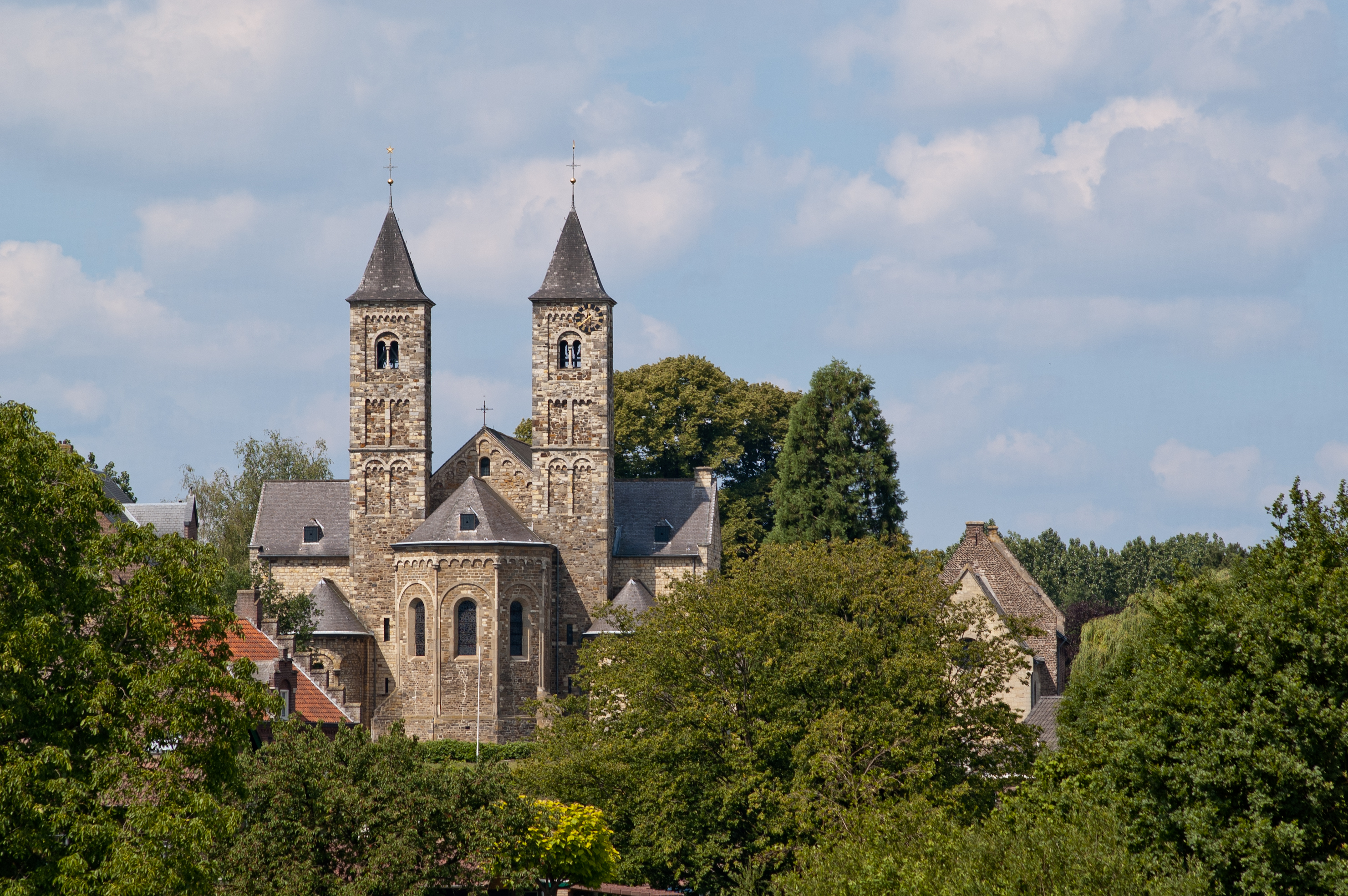 Die Basilika des niederländischen Ortes St. Odilienberg, gesehen von der östlich gelegenen Rurbrücke aus